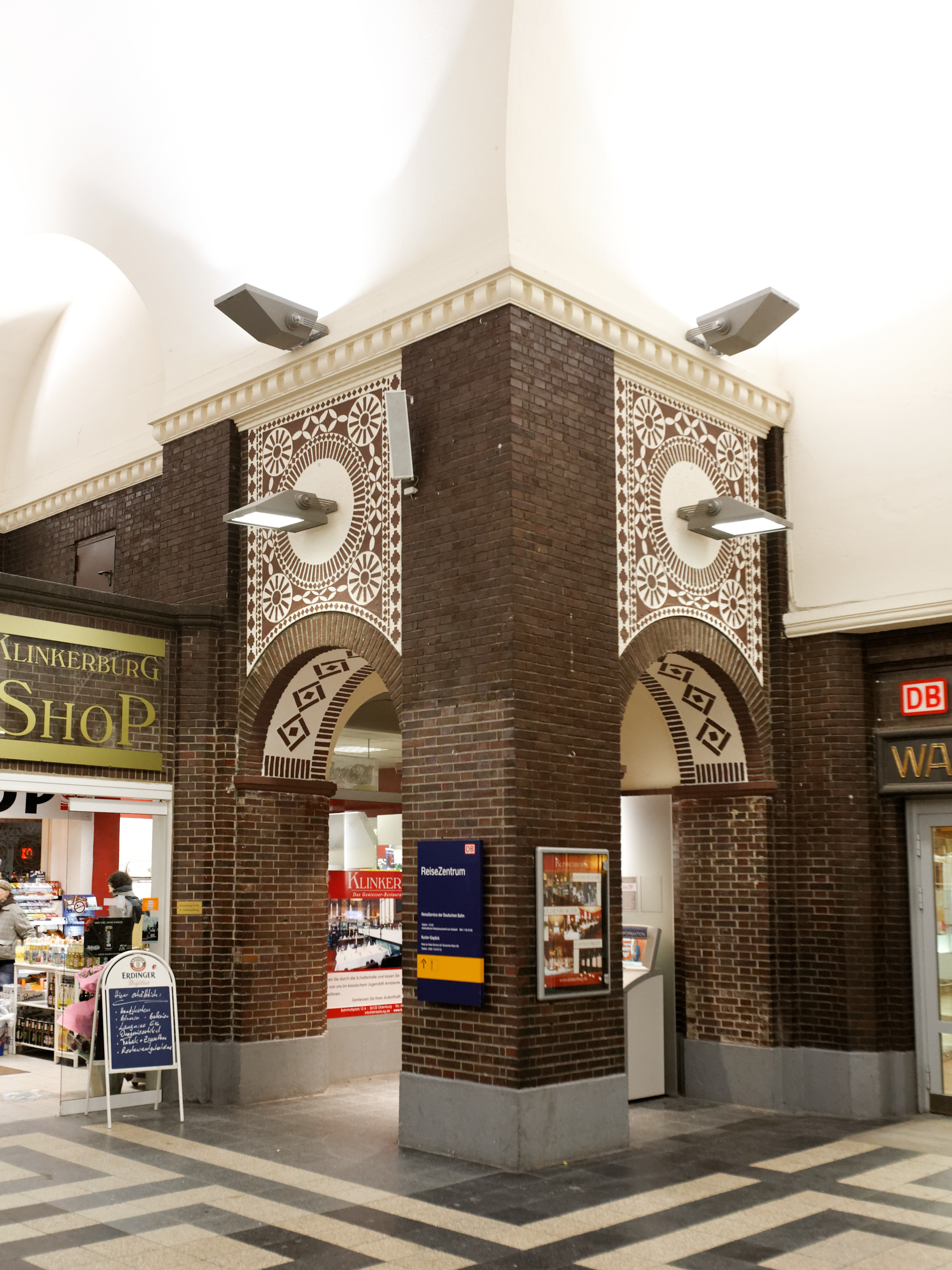 Innenansicht des Oldenburger Bahnhofs